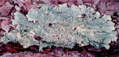 Punctelia rudecta